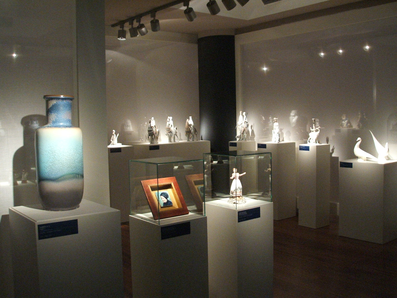 Vista de una sala de la colección de porcelana histórica del Museo Lladró